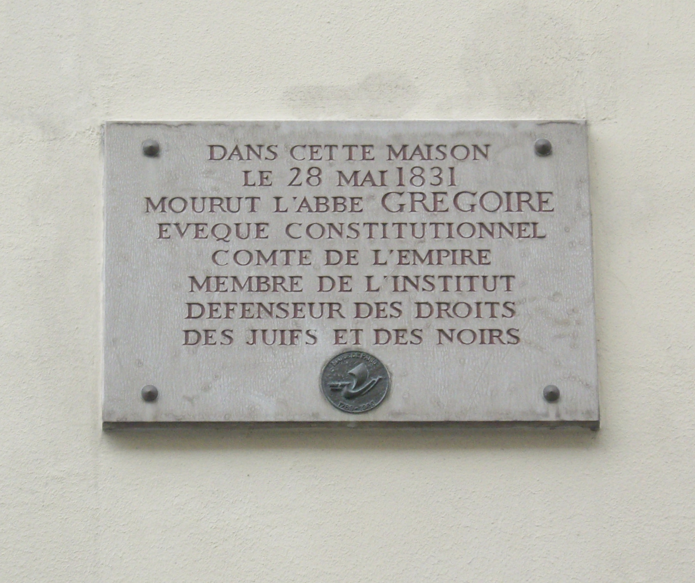 Plaque apposée au n° 44 de la rue du Cherche-Midi, Paris 6e. « Dans cette maison, le 28 mai 1831, mourut l'abbé Grégoire, évêque constitutionnel, comte de l'Empire, membre de l'Institut, défenseur des droits des juifs et des noirs. »